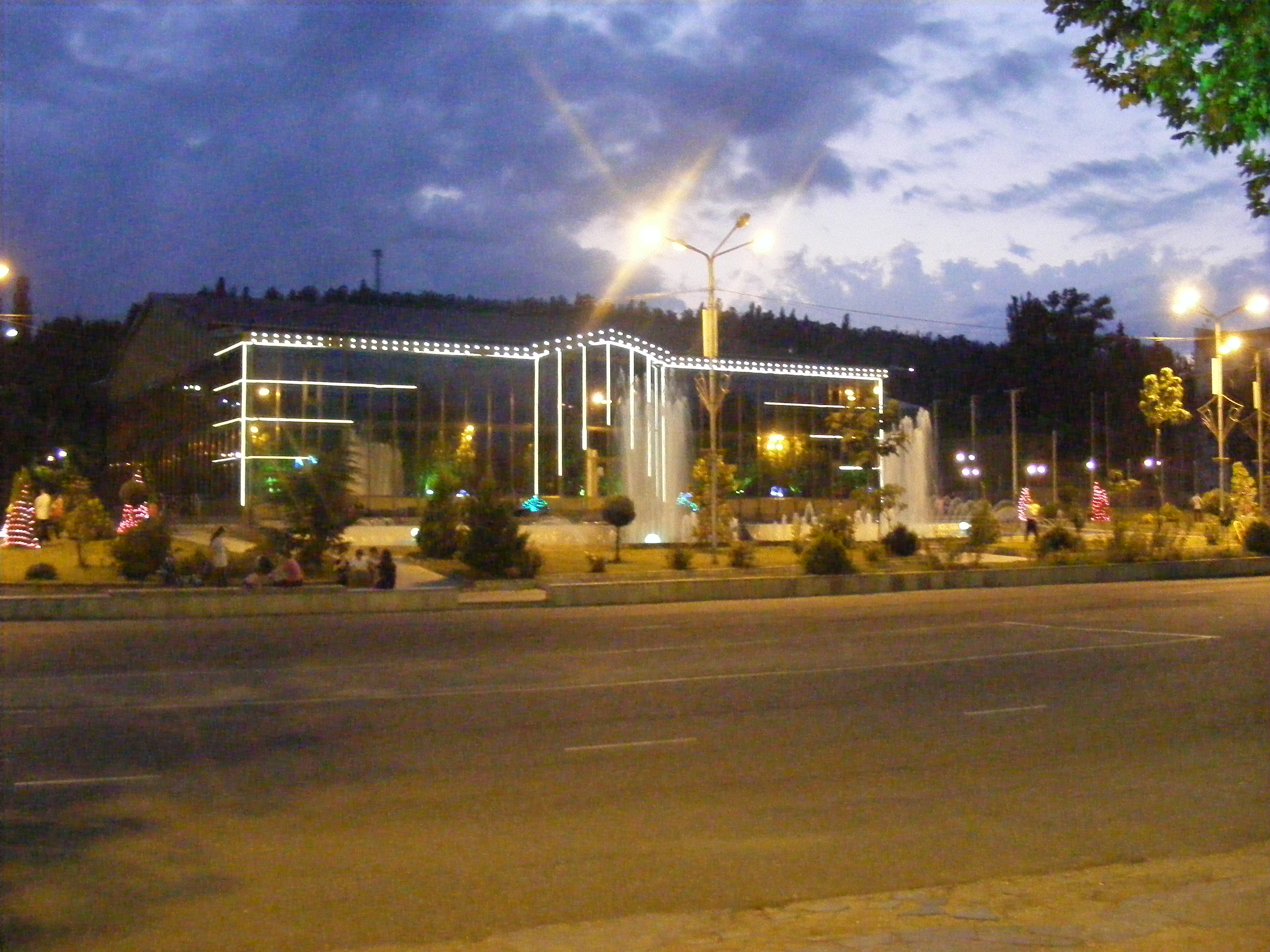 თერჯოლის სპორტის სასახლე